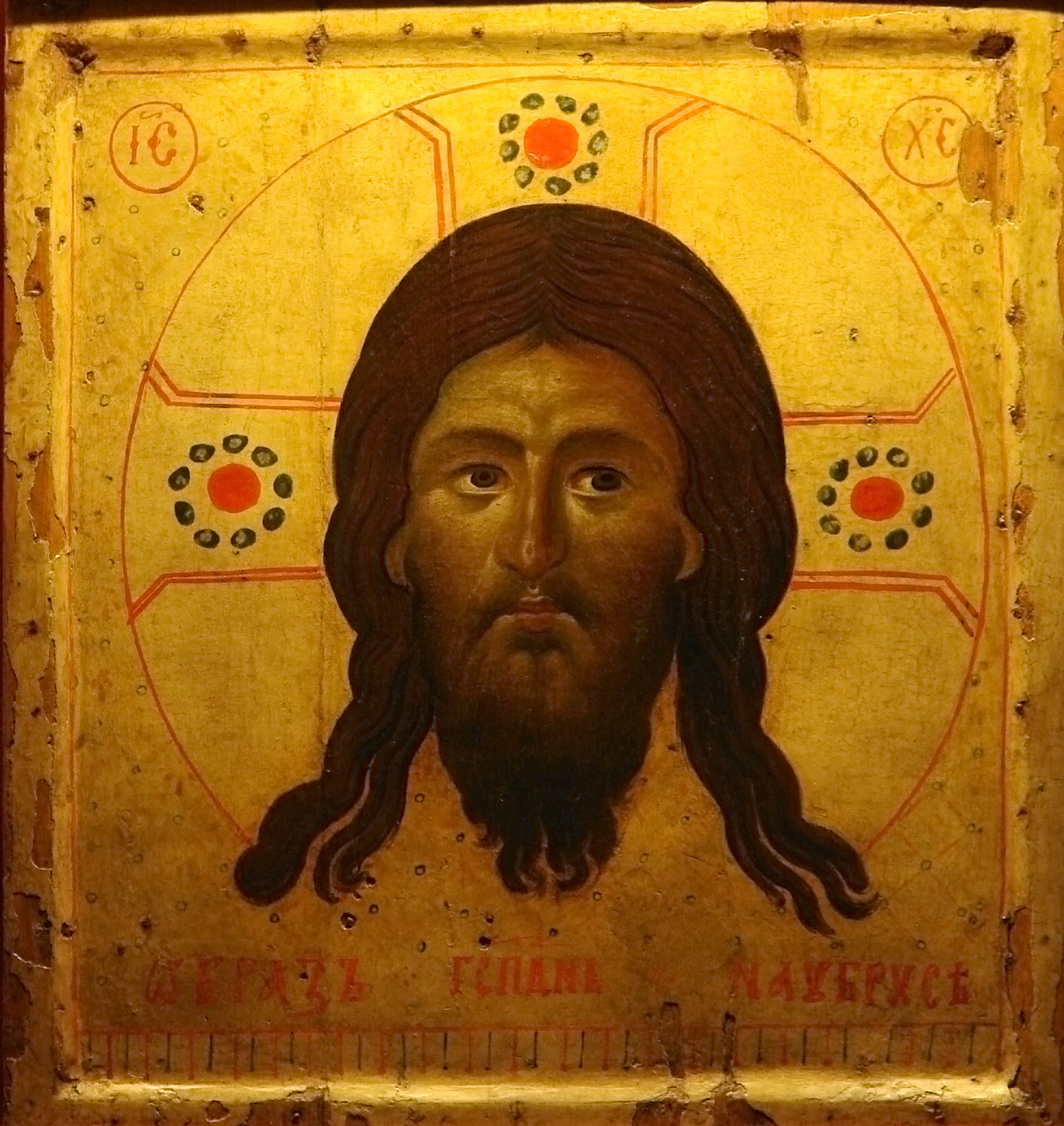 Icône de la Sainte Face (Mandylion), achetée en 1249 à Bari (Italie) par Jacques Pantaléon, archidiacre de la cathédrale de Laon devenu ensuite le pape Urbain IV. Exposée dans la cathédrale de Laon. Inscription down is in Church Slavonic: Образ Господень на убрусе (Image of God at the shawl)